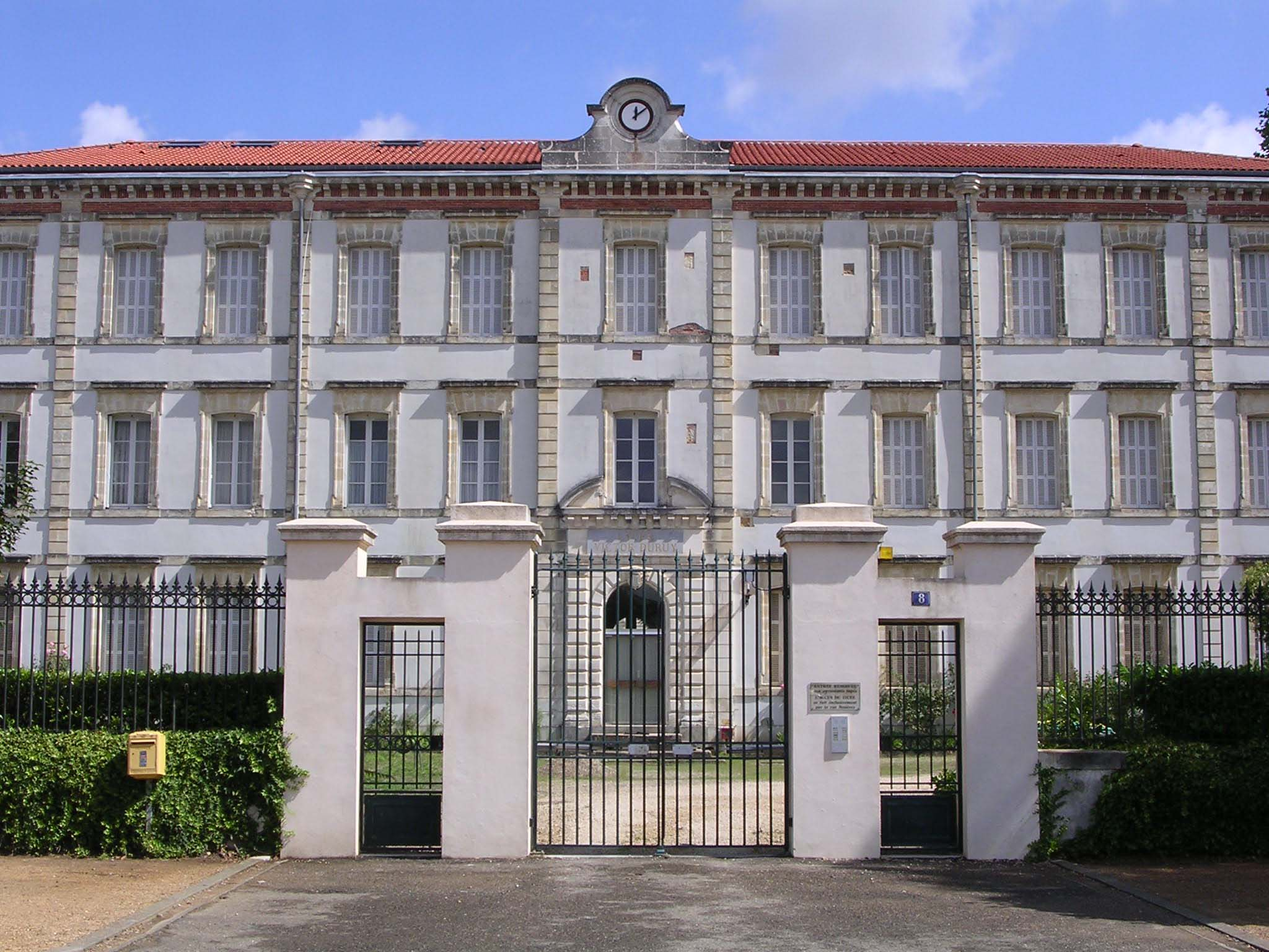 Conciergerie du lycée V.Duruy Mont-de-Marsan